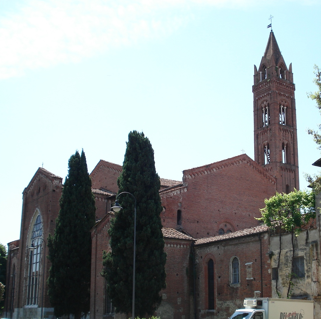 Chiesa di san Francesco a Pisa - vista dell'abside e del campanile